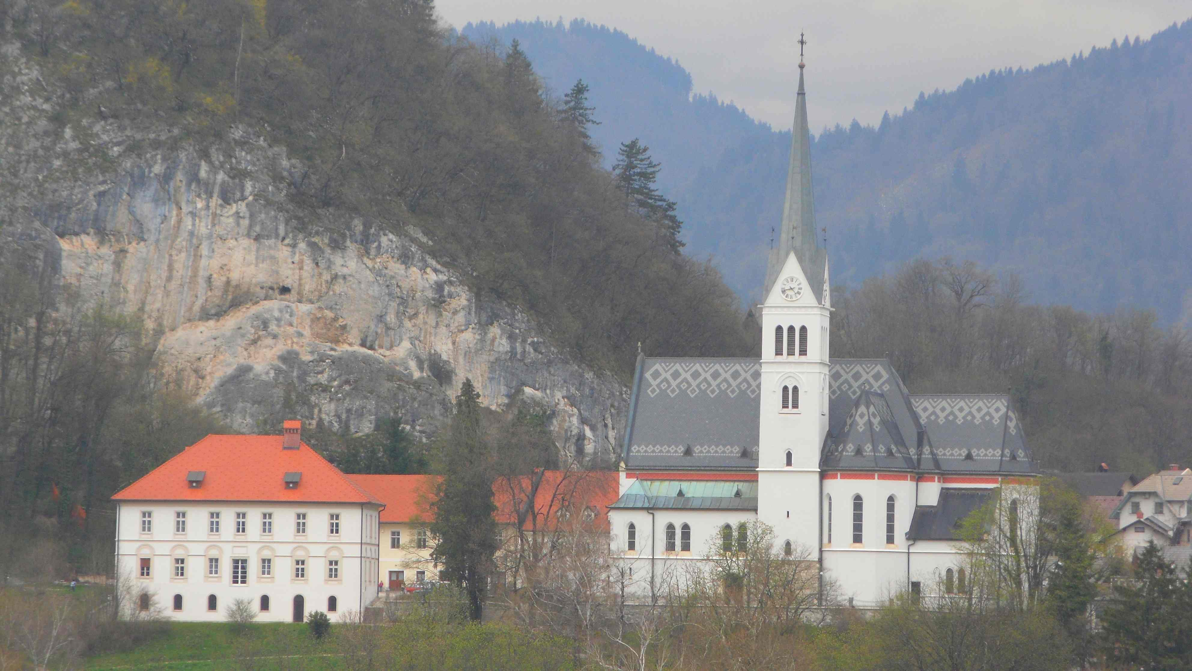 Die dem heiligen Martin gewidmete, neugotische Pfarrkirche in Bled